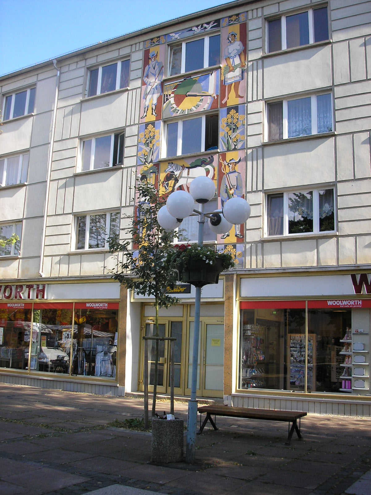 Am Marktplatz in Sömmerda (Thüringen). Deutlich zu erkennen ist die DDR-typische Umgestaltung mit Plattenbau, Wandbemalung, Kronleuchterlaterne, Beton-Gehsteigplatten und Steinchenpapierkorb.